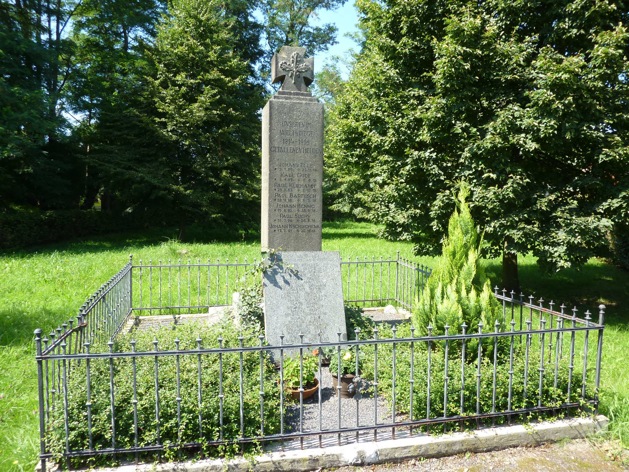 Kriegerdenkmal für die Gefallenen des Ersten Weltkriegs in Wartha (Gemeinde Königswartha), Sachsen Hornjoserbsce: Wojerski pomnik padnjenym prěnjeje swětoweje wójny w Stróži, gmejna Rakecy